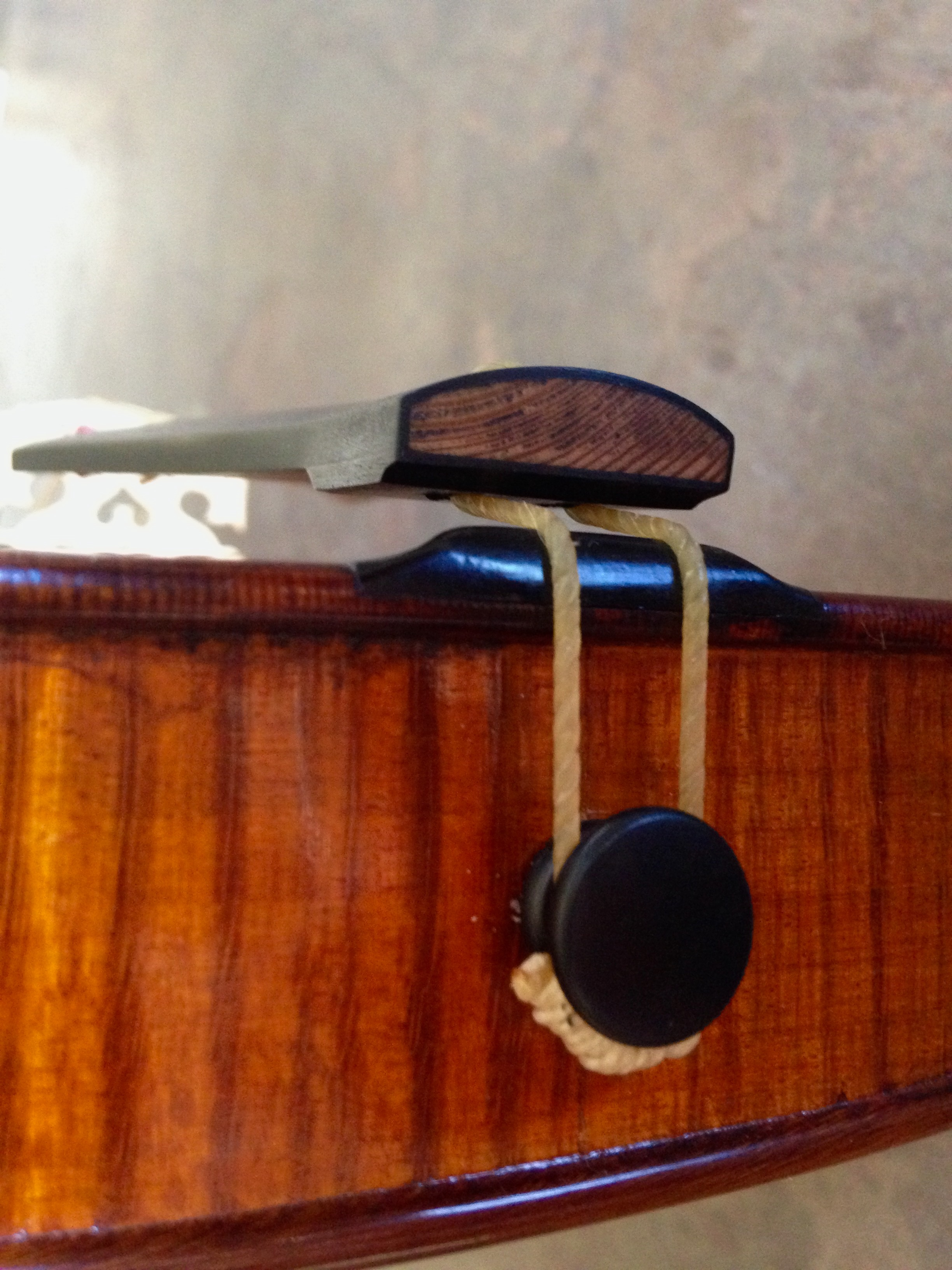 Baroque violin Walter Mahr, 2010 - Tailgut